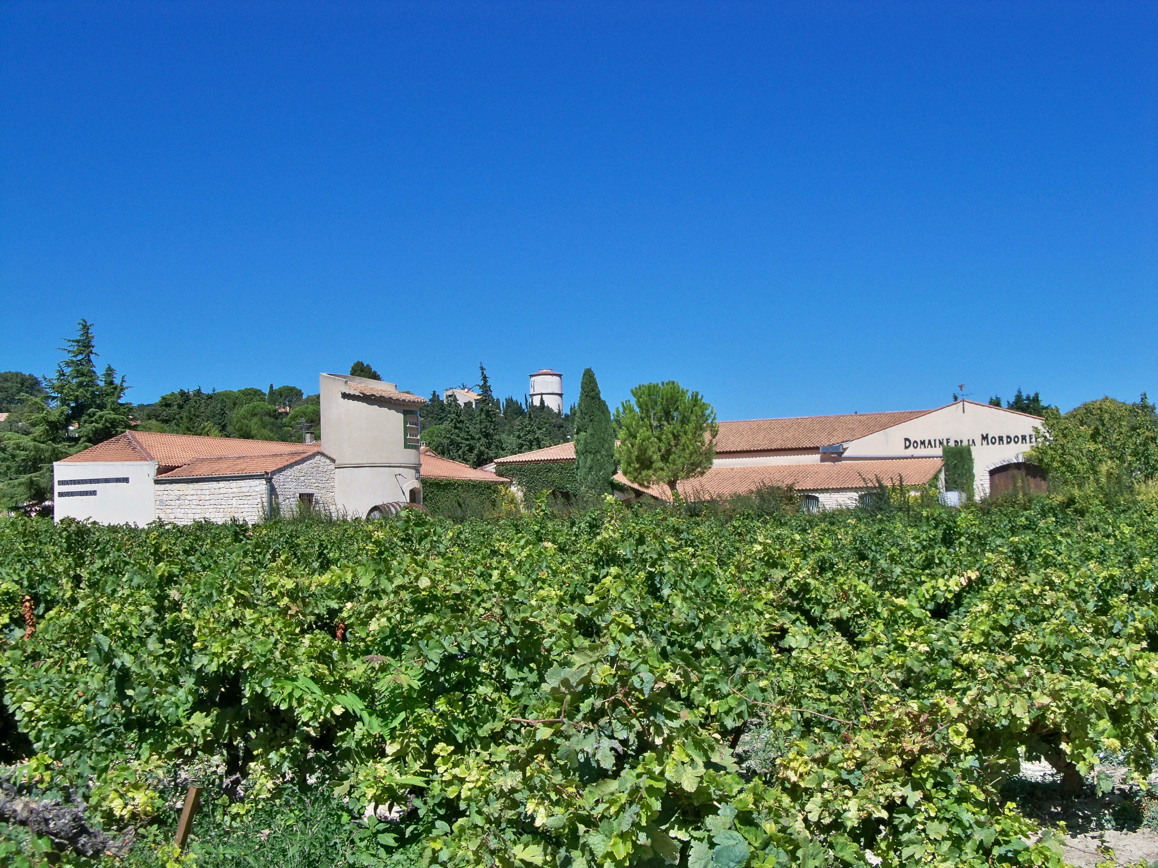 Domaine vinicole à Tavel (Gard)